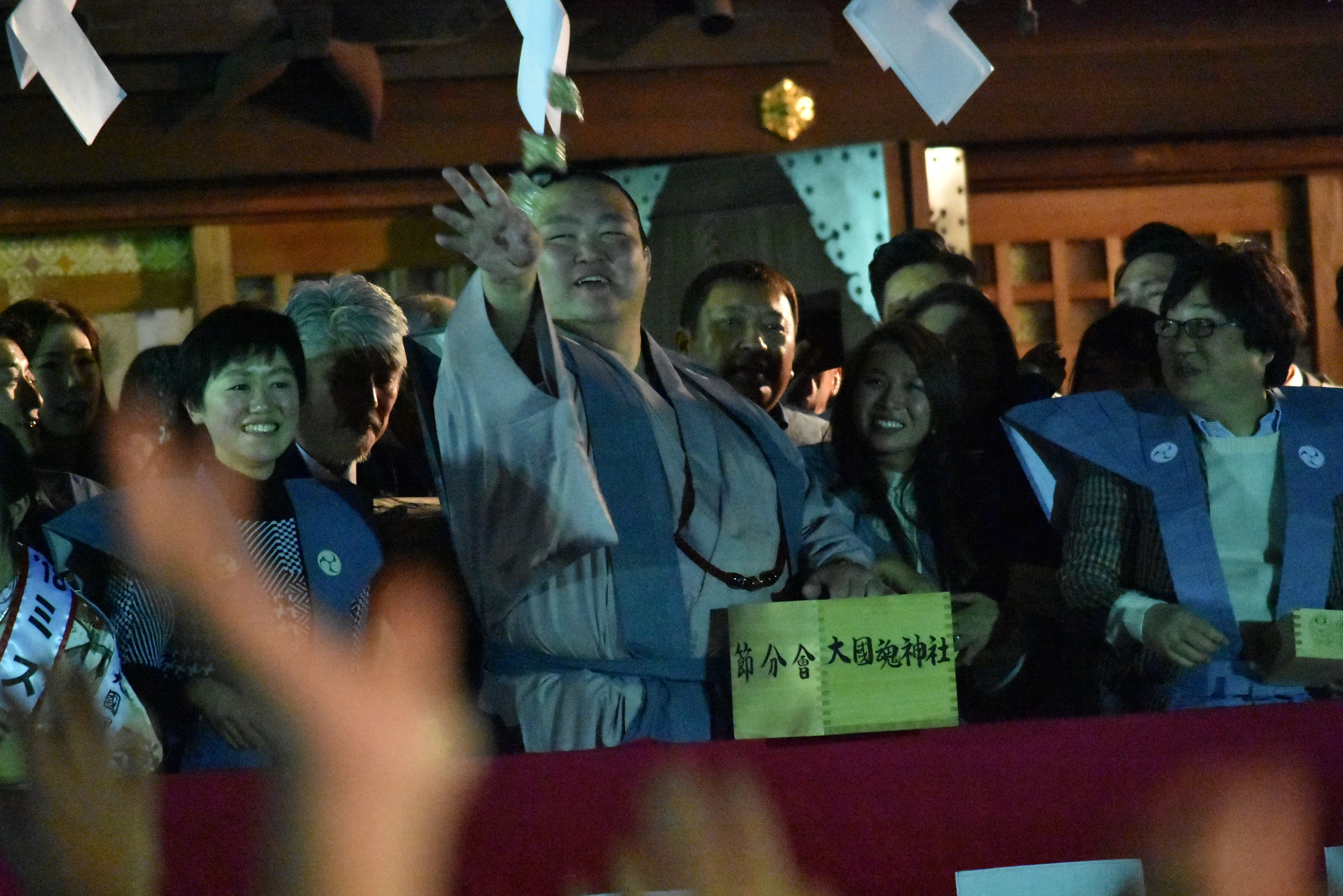 大相撲・荒磯親方。大國魂神社節分祭にて。 Nikon D3400